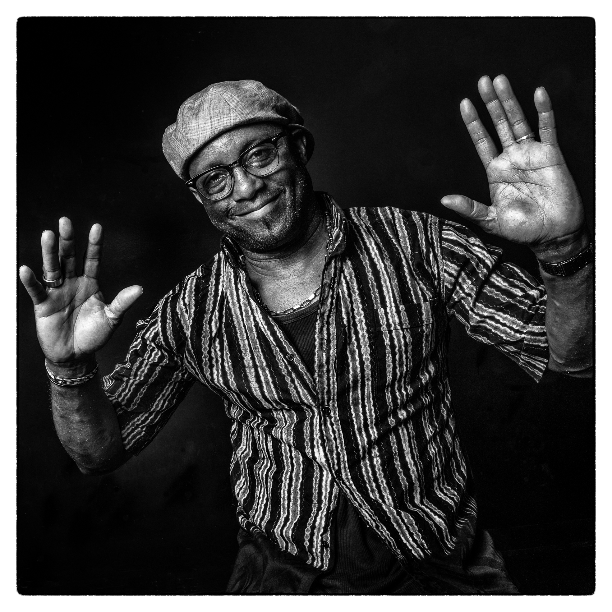 Ka percussions